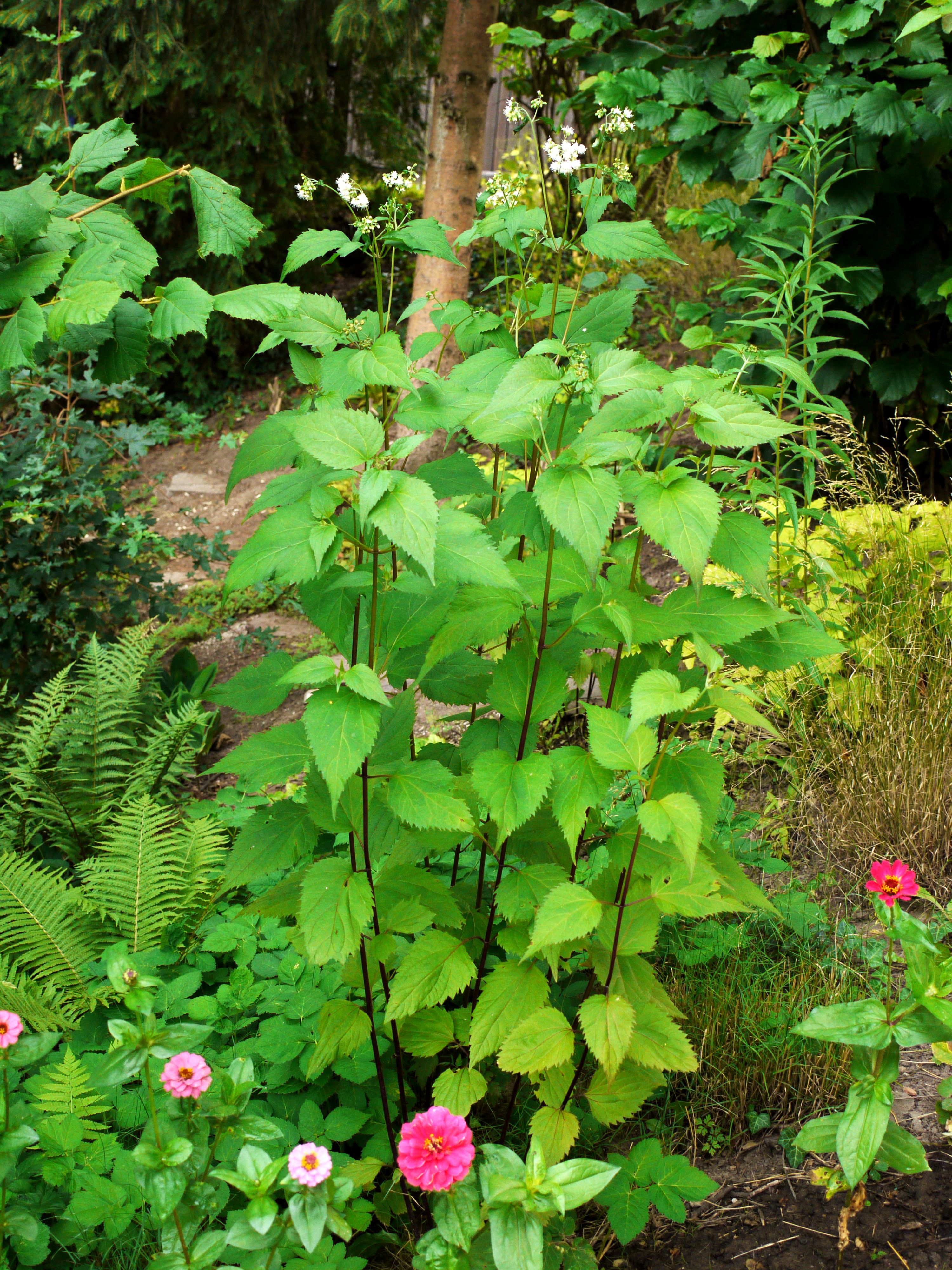 Ageratina altissima alias Eupatorium rugosum. Garten in Mittelfranken. Höhe ca. 1,5 m